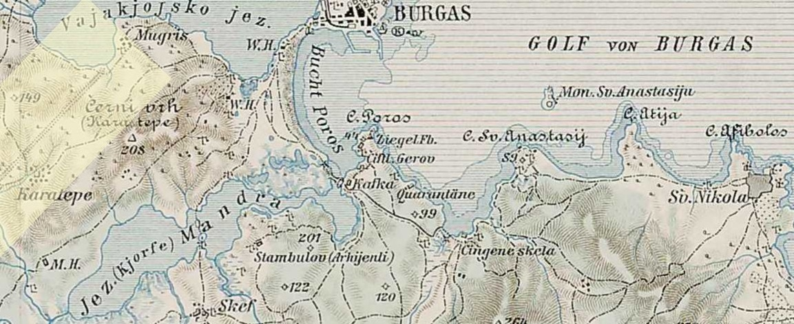 Burgas Region 1880